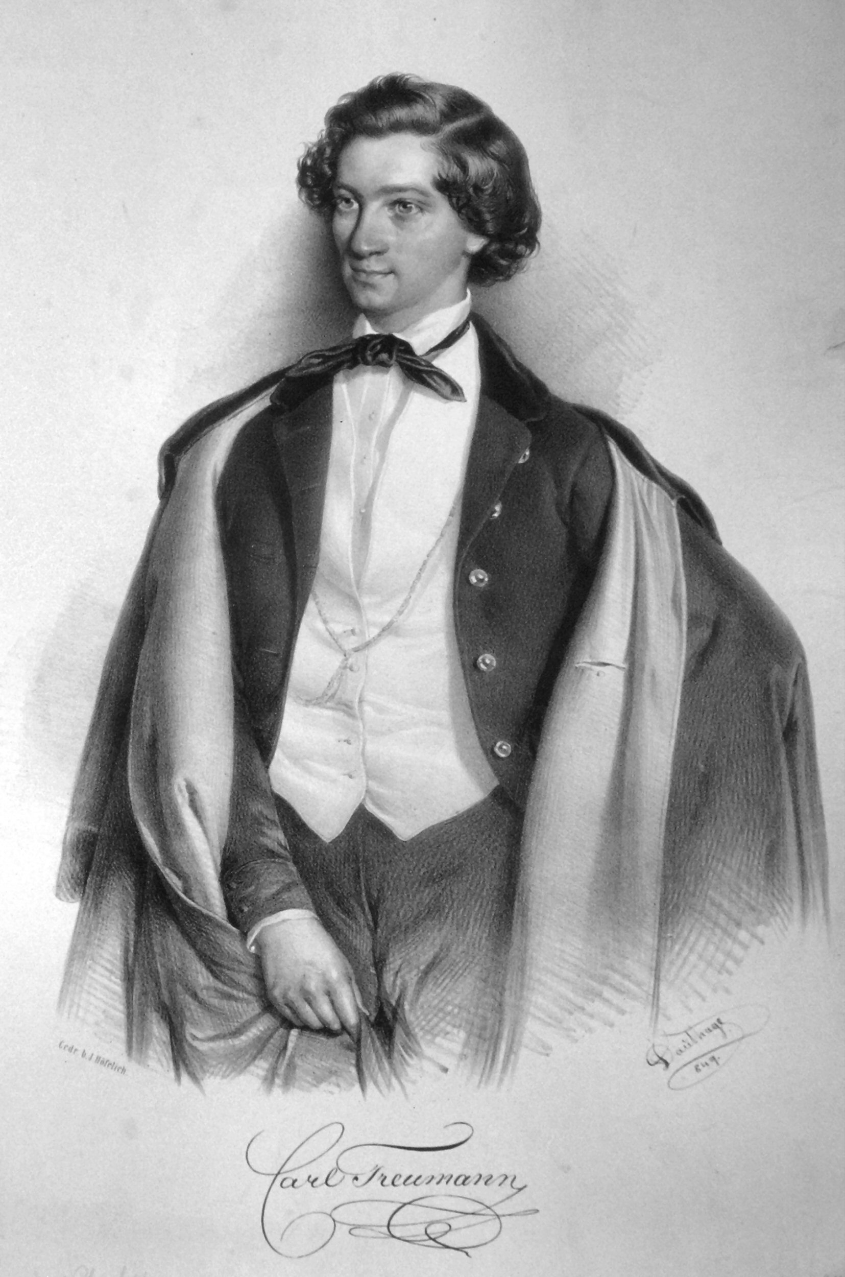 Karl Treumann (1823-1877), österreichischer Schauspieler. Lithographie von Adolf Dauthage, 1849